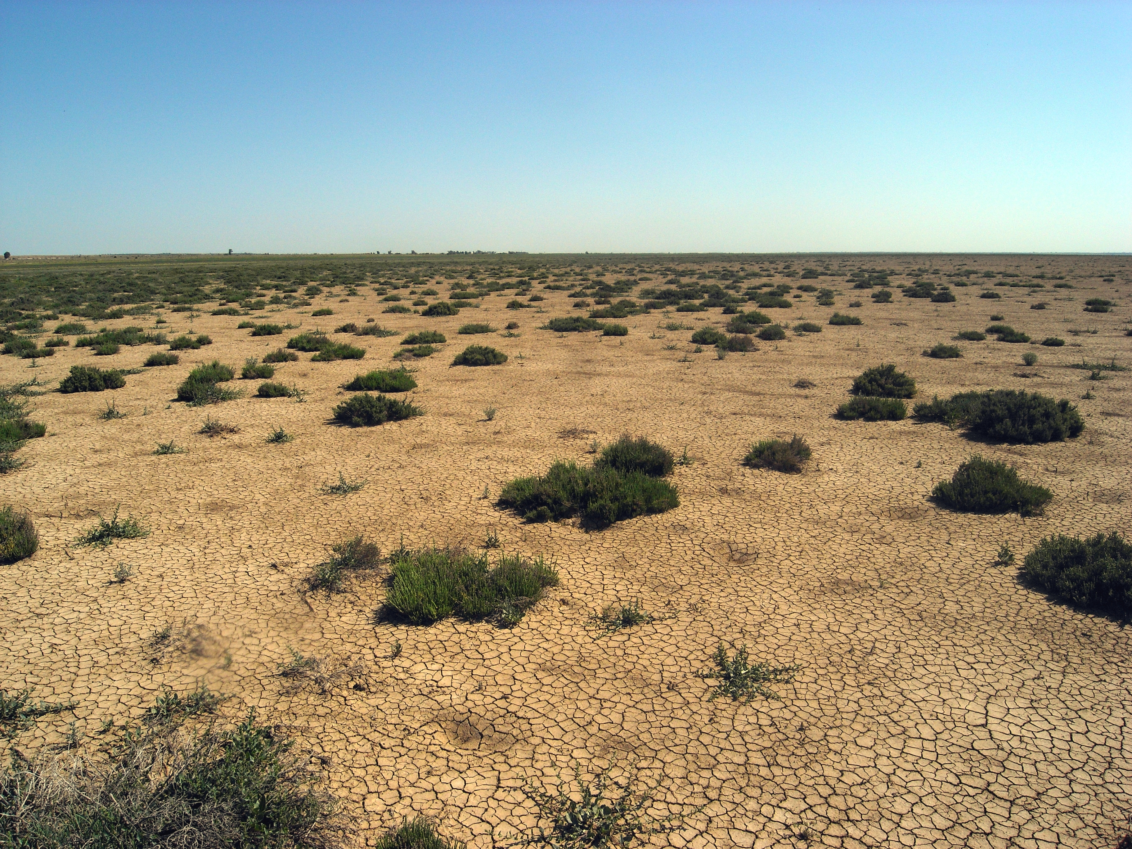 Trockengefallene Sebkhat Kelbia nahe Kondar, Tunesien, ca. 30 km westlich von Sousse, 2009